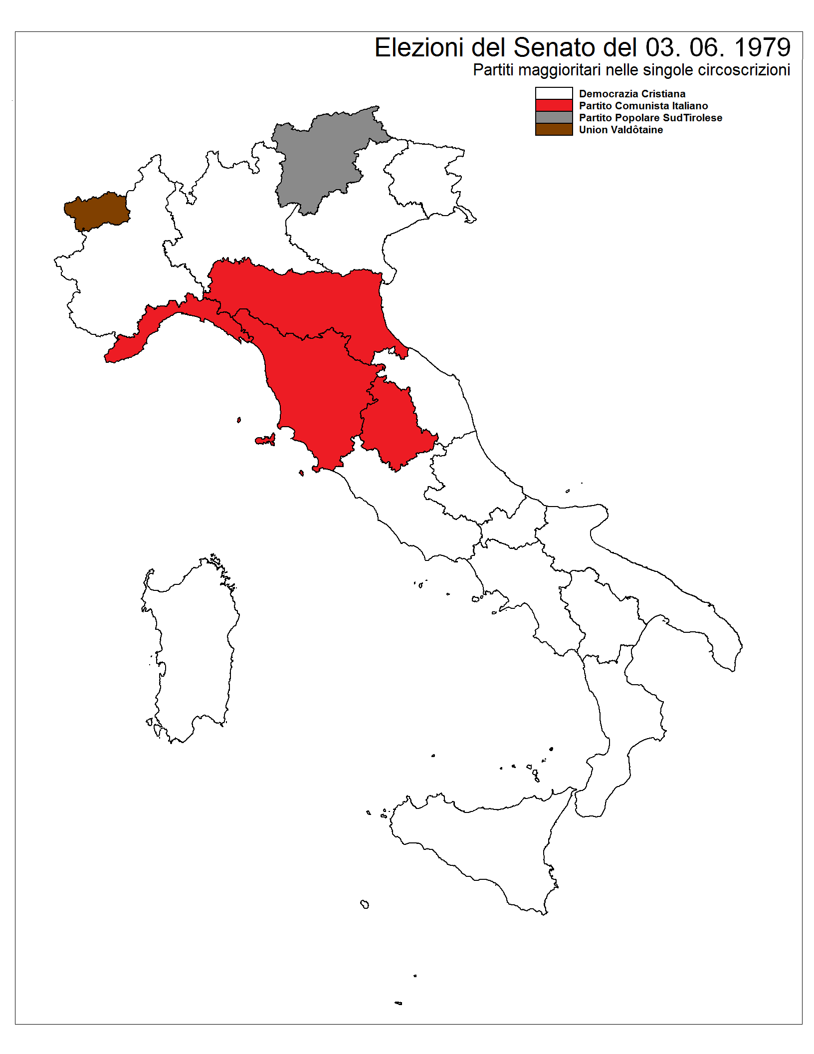 पाली pālī: Partiti maggioritari nel 1979 nelle singole circoscrizioni.